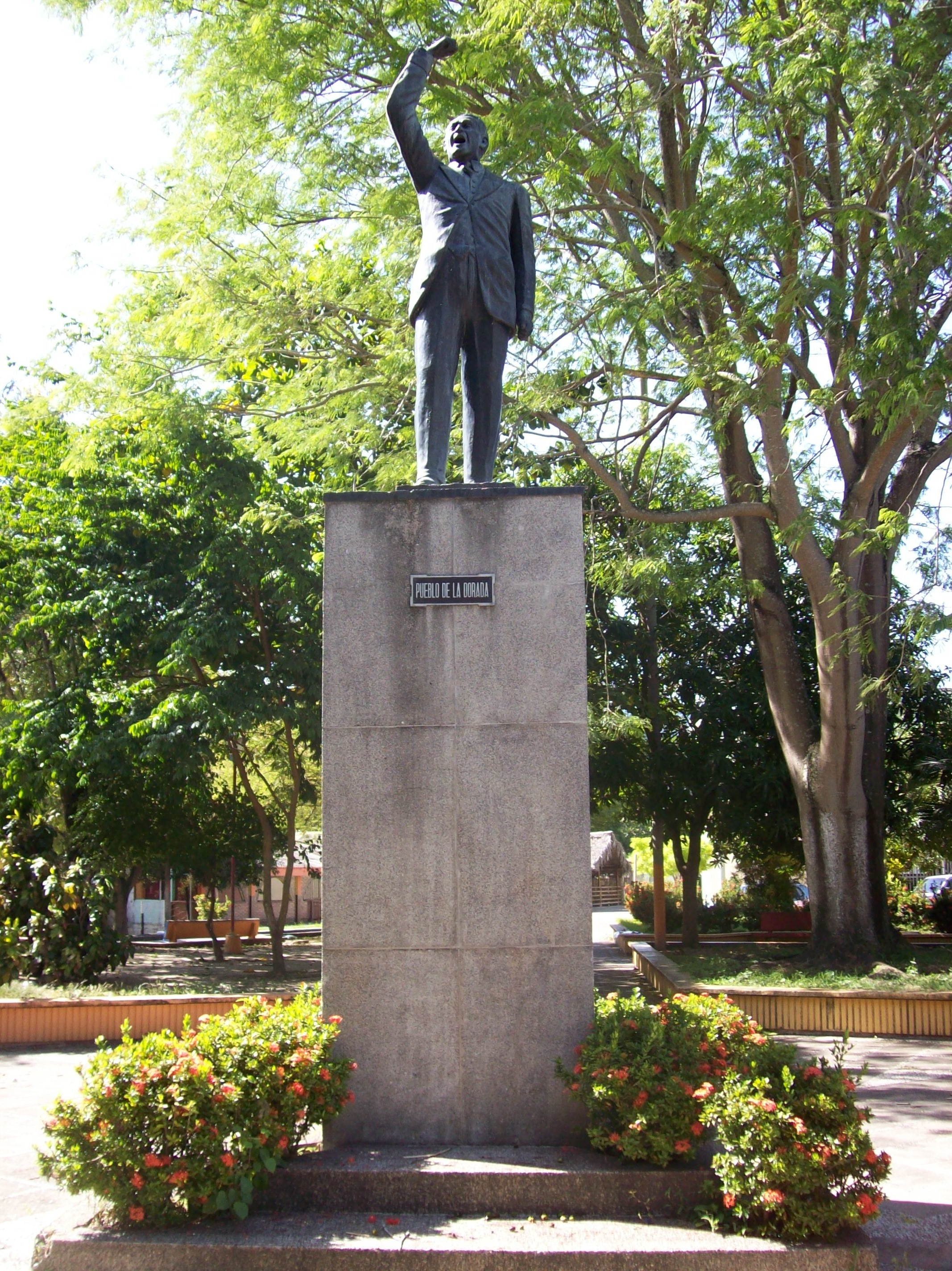 Escultura de Jorge Eliécer Gaitán en el Parque Jorge Eliécer Gaitán, La Dorada.